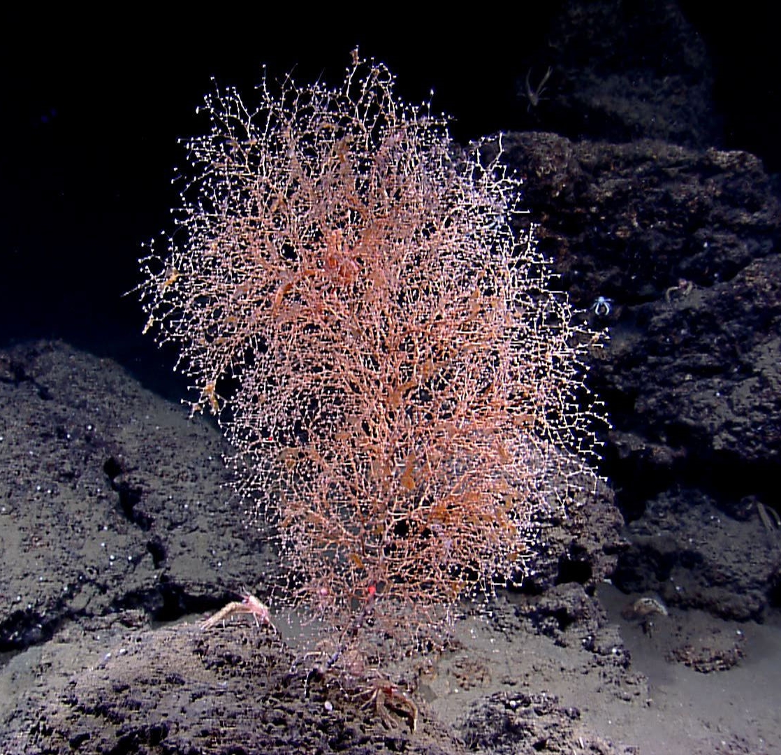 Chrysogorgia sp